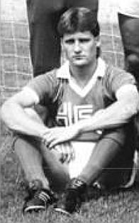 Title: Mannschaftsfoto HFC Chemie Factual corrections and alternative descriptions are encouraged separately from the original description. Additionally errors can be reported at this page to inform the Bundesarchiv. Original historic description: ADN-ZB-Lehmann-4.10.88-tre-Halle: DDR-Fußball-Oberliga. Saison 1988-89. Mannschaft des HFC Chemie. Obere Reihe v.l.: Trainer Karl Trautmann, Andreas Wagenhaus, Martin Trocha, Uwe Machold, Torsten Häußler, Gisbert Pennecke, Jan Rziha, Lutz Weidner, Gert Brauer, Steffen Karl, Ass.-Trainer Bernd Donau; mittlere Reihe v.l.: Lutz Radtke, Uwe Lorenz, Jens Helling, Darusz Wosz, Lutz Schülbe, Torsten Raspe; untere Reihe v.l.: Dietmar Schütze, Frank Wiermann, Karsten Härtel, Jens Adler, Dirk Wüllbier und Rene Tretschok.